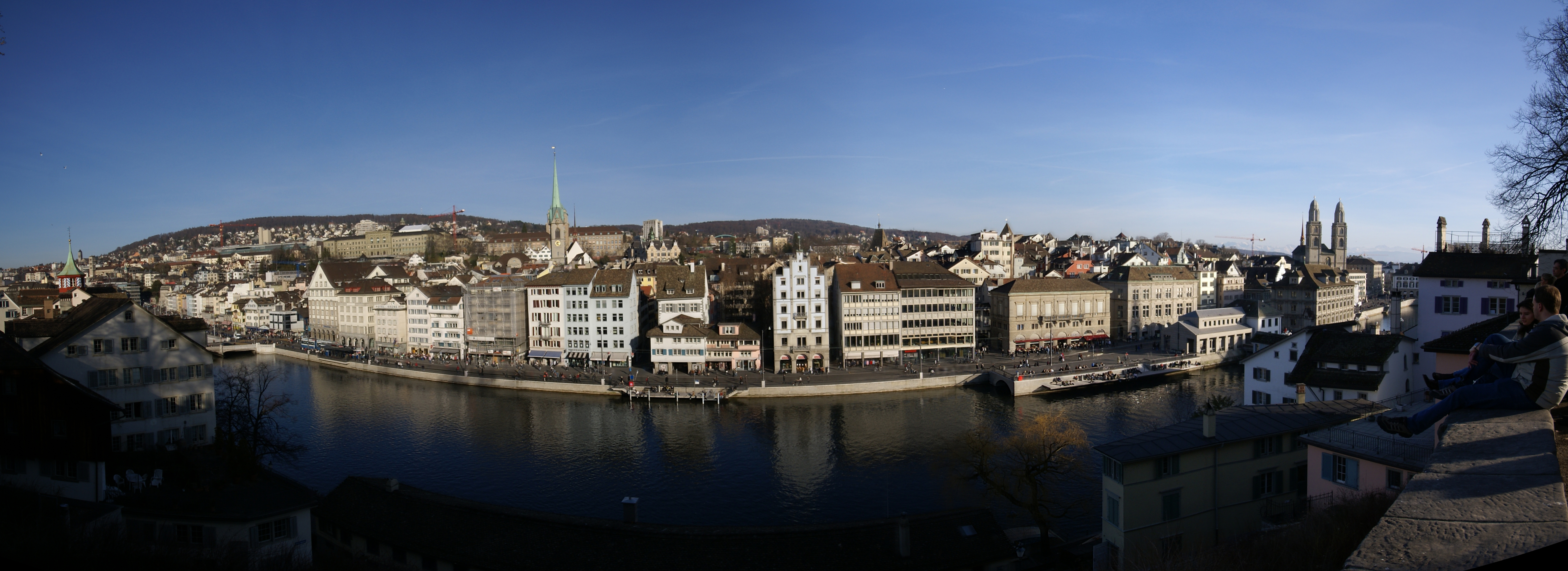 Вид с линденхоф